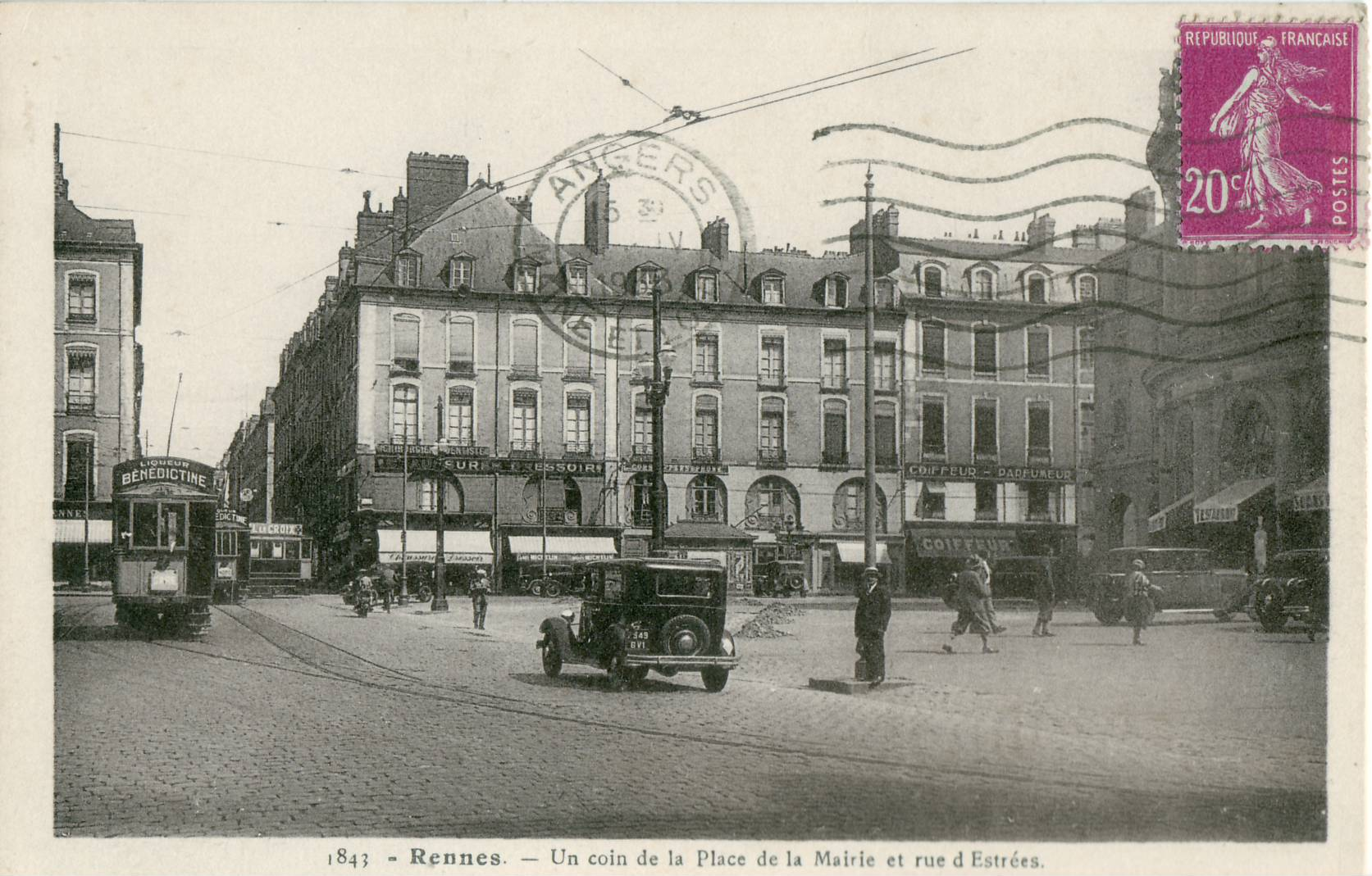 Carte postale ancienne éditée par Laurent-Nel à Rennes. Titre : 1843 − Rennes − Un coin de la Place de la Mairie et Rue d'Estrées.